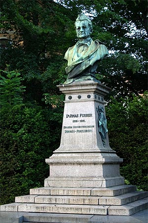 Jonas Furrer - Denkmal von Gustav Siber (1895) in Winterthur (Nr. 03.1-5358)